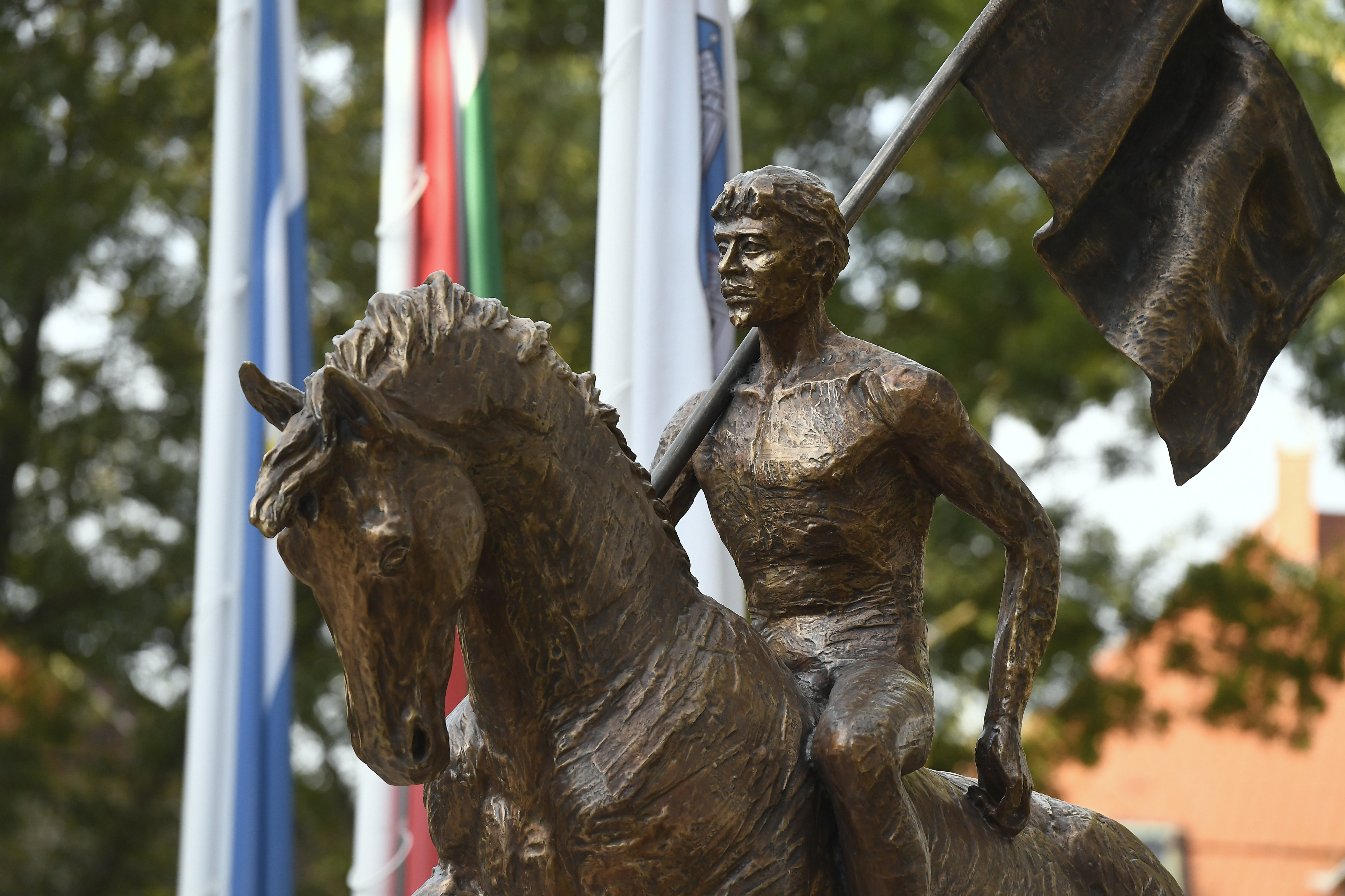 Budapest, 2019. október 4. Czetz János honvédtábornok lovas szobra Békásmegyeren, a Lékai bíboros téren az avatóünnepség napján, 2019. október 4-én. MTI/Koszticsák Szilárd